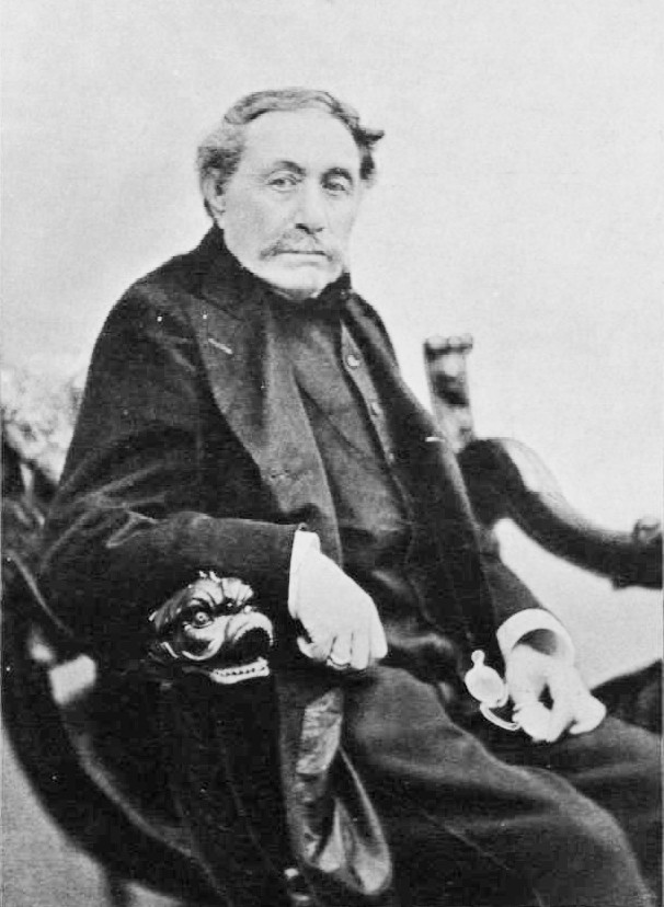 Csemegi Károly (1826–1899) 1848–49-es honvédtiszt, büntetőjogász, az első magyar büntető törvénykönyv kodifikátora. Erdélyi Mór fényképfelvétele